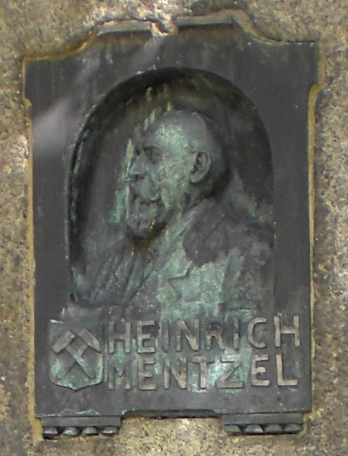 Heinrich Mentzel, Portrait am Gedenkstein in Schönebeck, aufgestellt im Jahr 1902